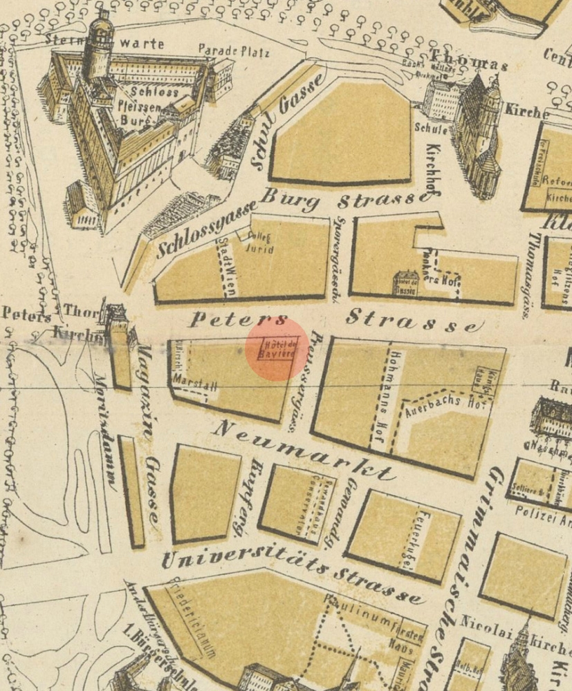 Das Hotel de Baviére auf einem Leipziger Stadtplan von 1858